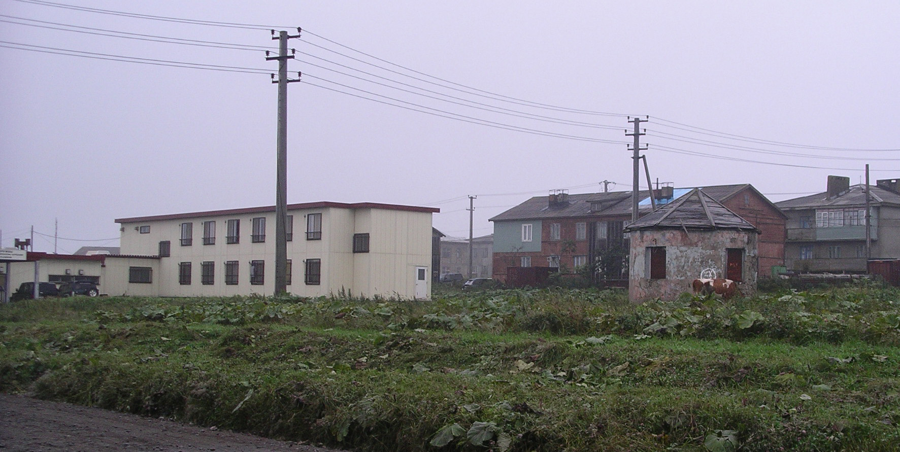 国後島古釜布の街なかに建つ「友好の家」。 投稿者撮影。--敷香 2007年4月18日 (水) 23:09 (UTC)